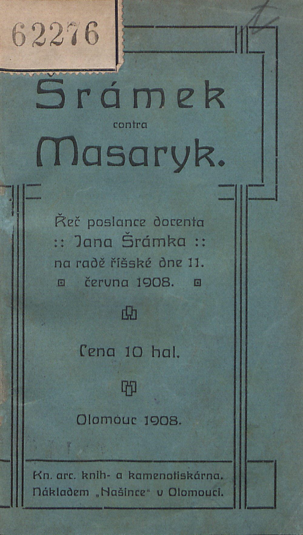 Obálka knihy Šrámek contra Masaryk z fondu Vědecké knihovny v Olomouci